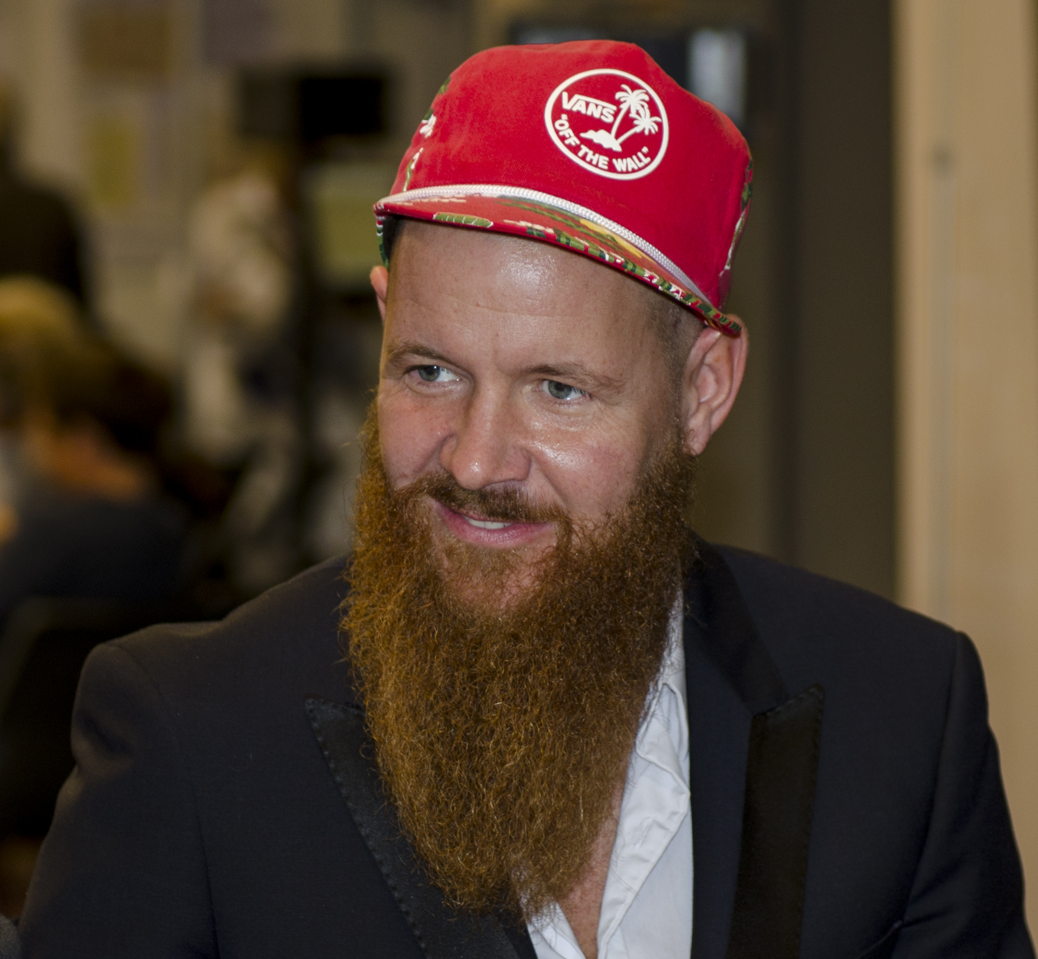 Christer Lundberg på Bokmässan i Göteborg 2014.